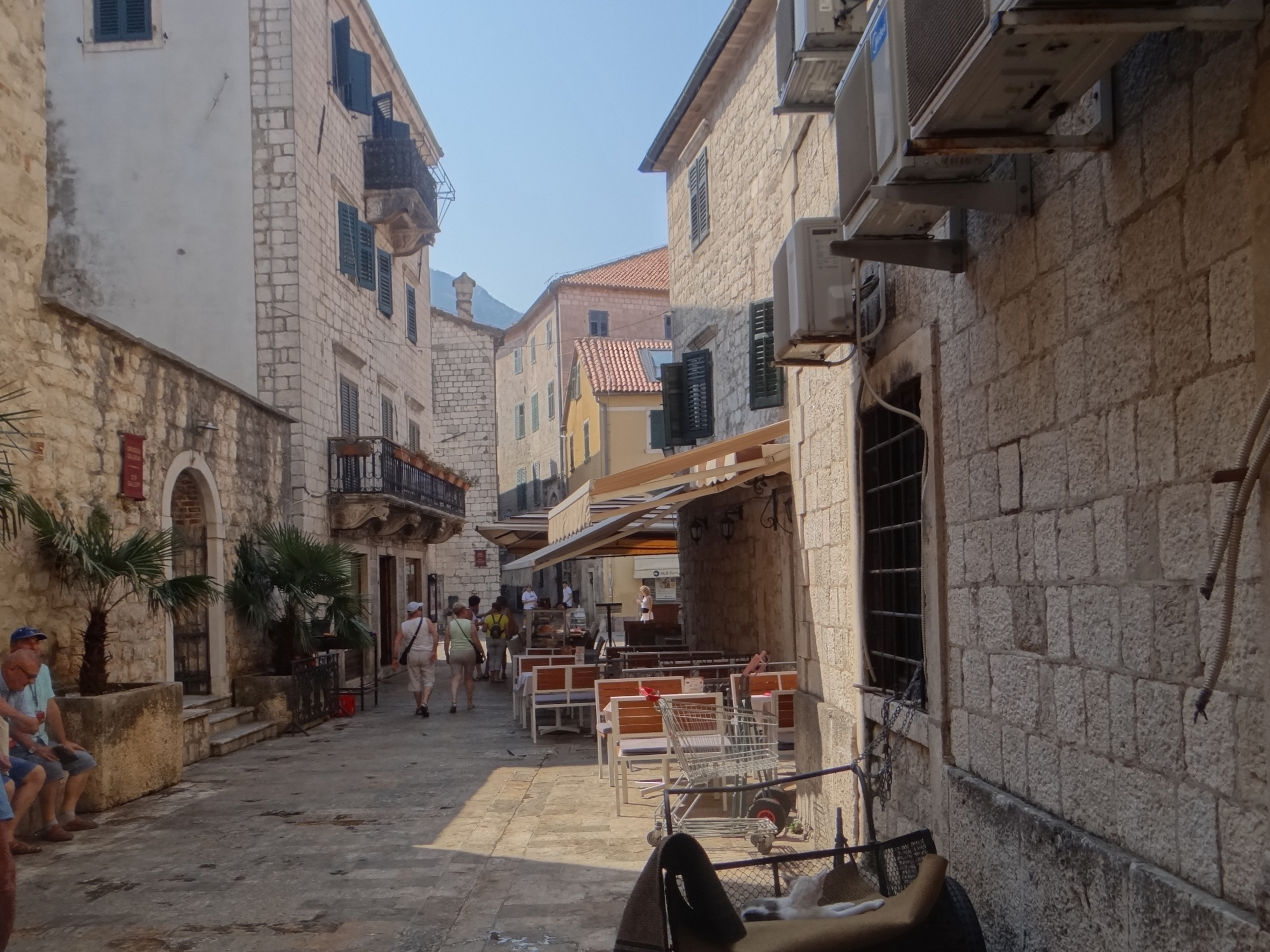 Kotor